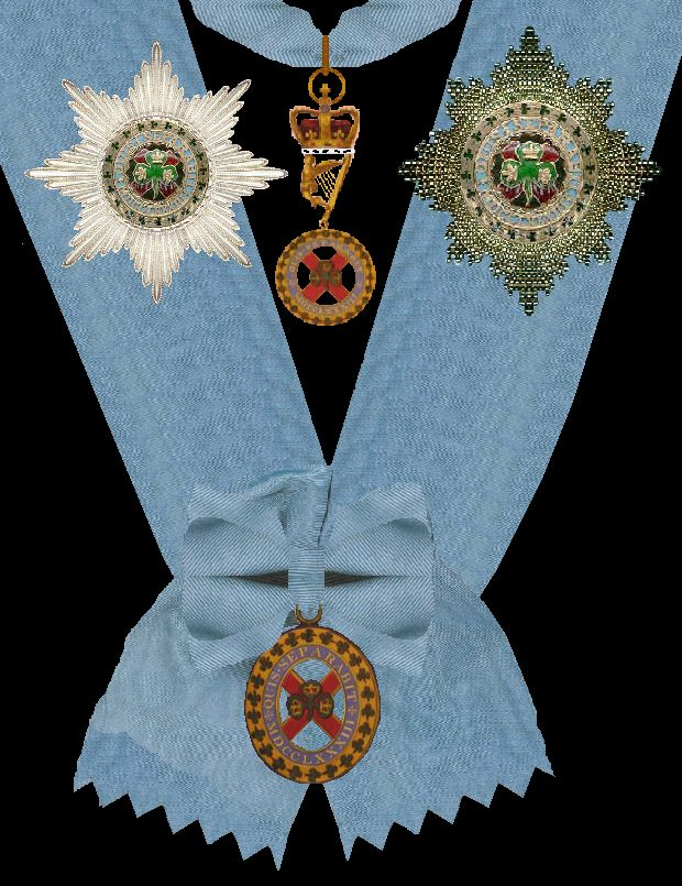 Twee gangbare uitvoeringen van de ster van de Orde van Sint Patrick, het grootlint met de ovale badge (ronde juwelen komen ook voor) en het, met een kroon verhoogde, aan een lint om de hals te dragen insigne van een Grootmeester zoals John Benton Pinkstone French, Graaf van Ieperen die droeg. Tekening van Robert Prummel